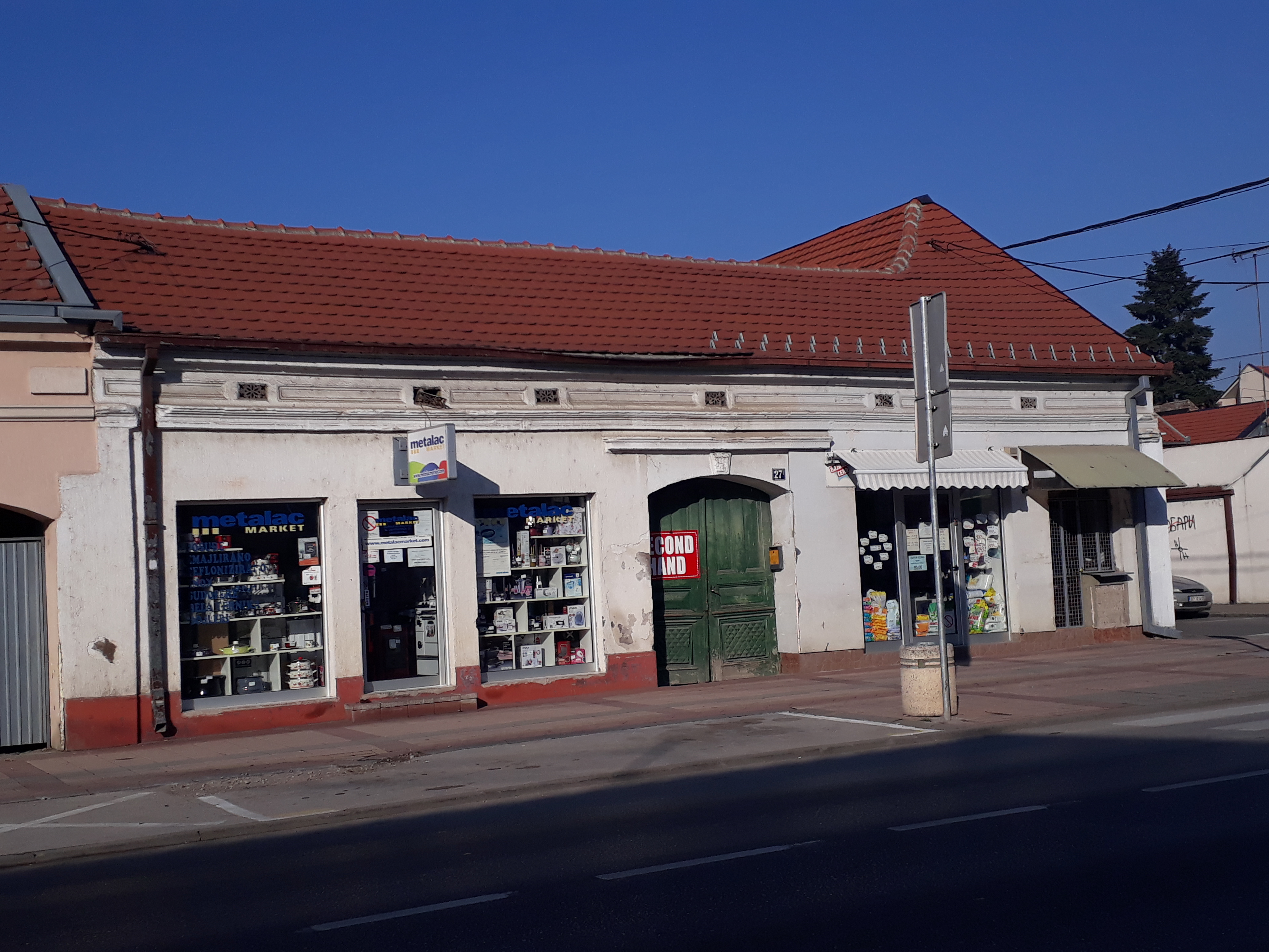 Kuća u kojoj se rodio Vlada Aksentijević